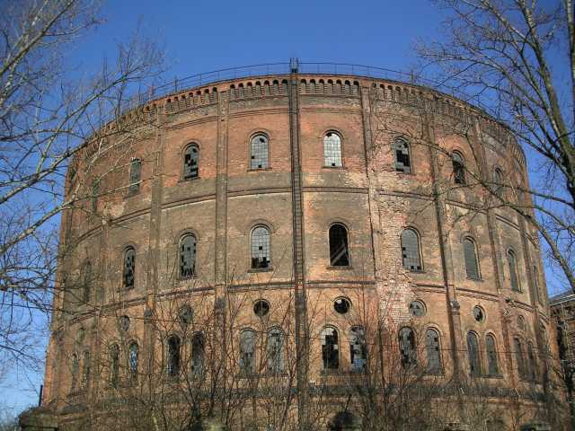 Warszawa, ruiny budynku zbiornika gazu w gazowni na Woli.